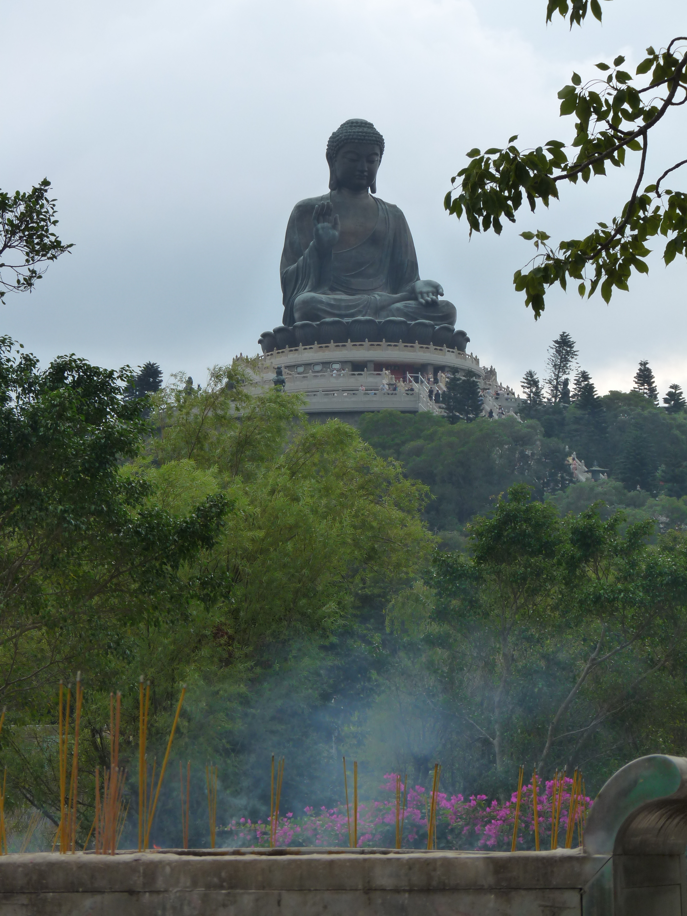 Tian Tan Buddha